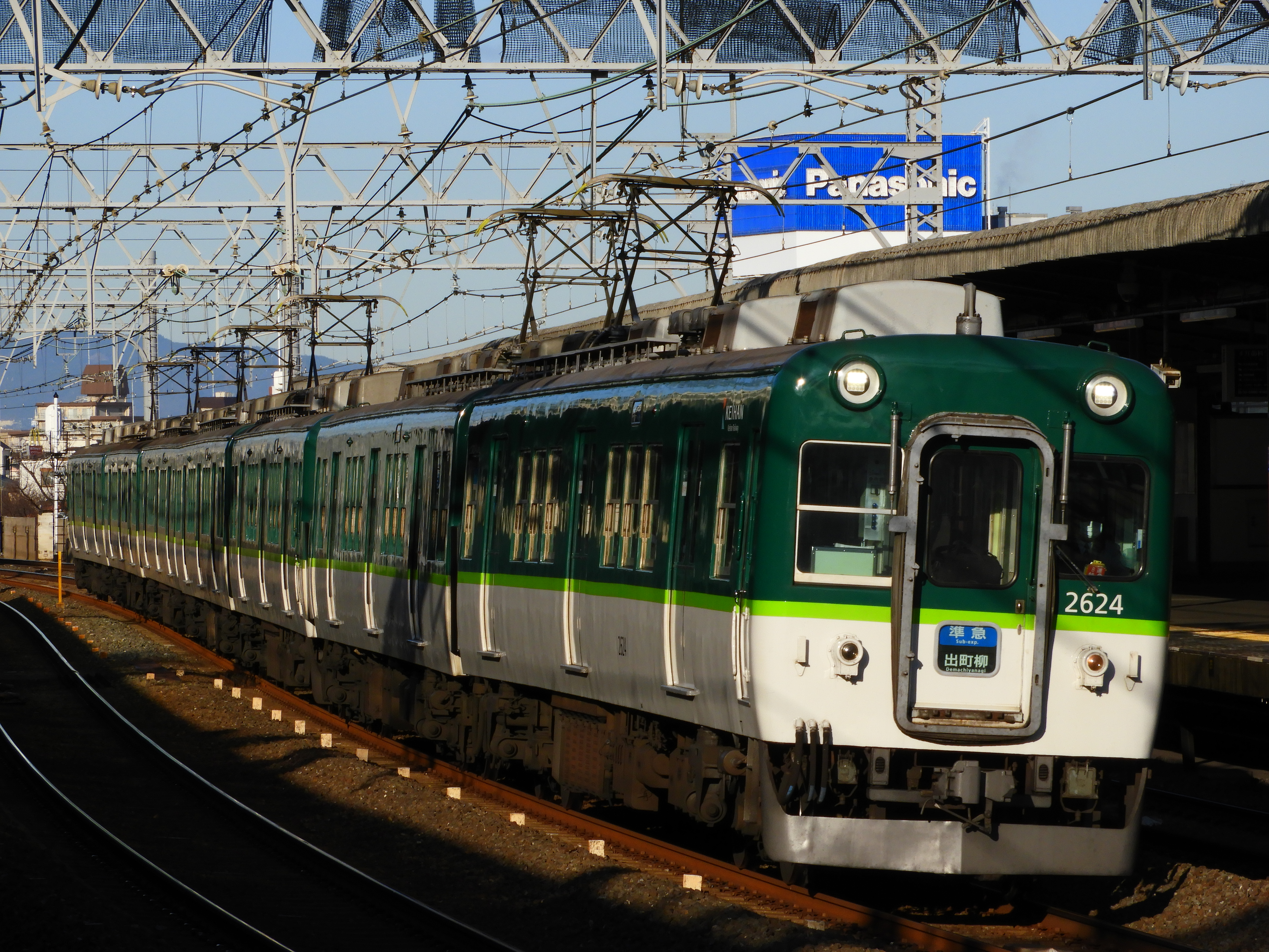 2624号車(新塗装前照灯LED、渡り板撤去)